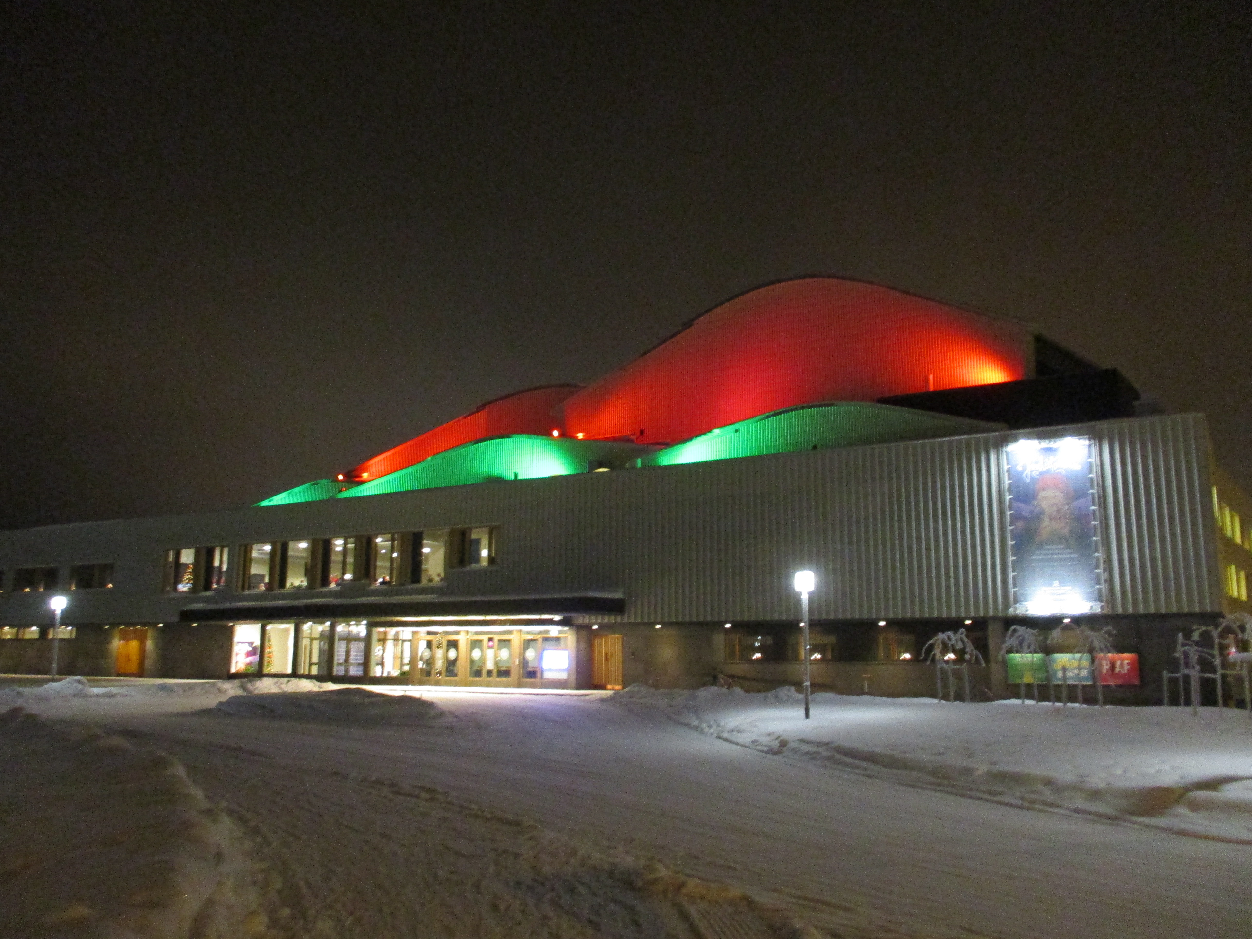 Lappia-talo